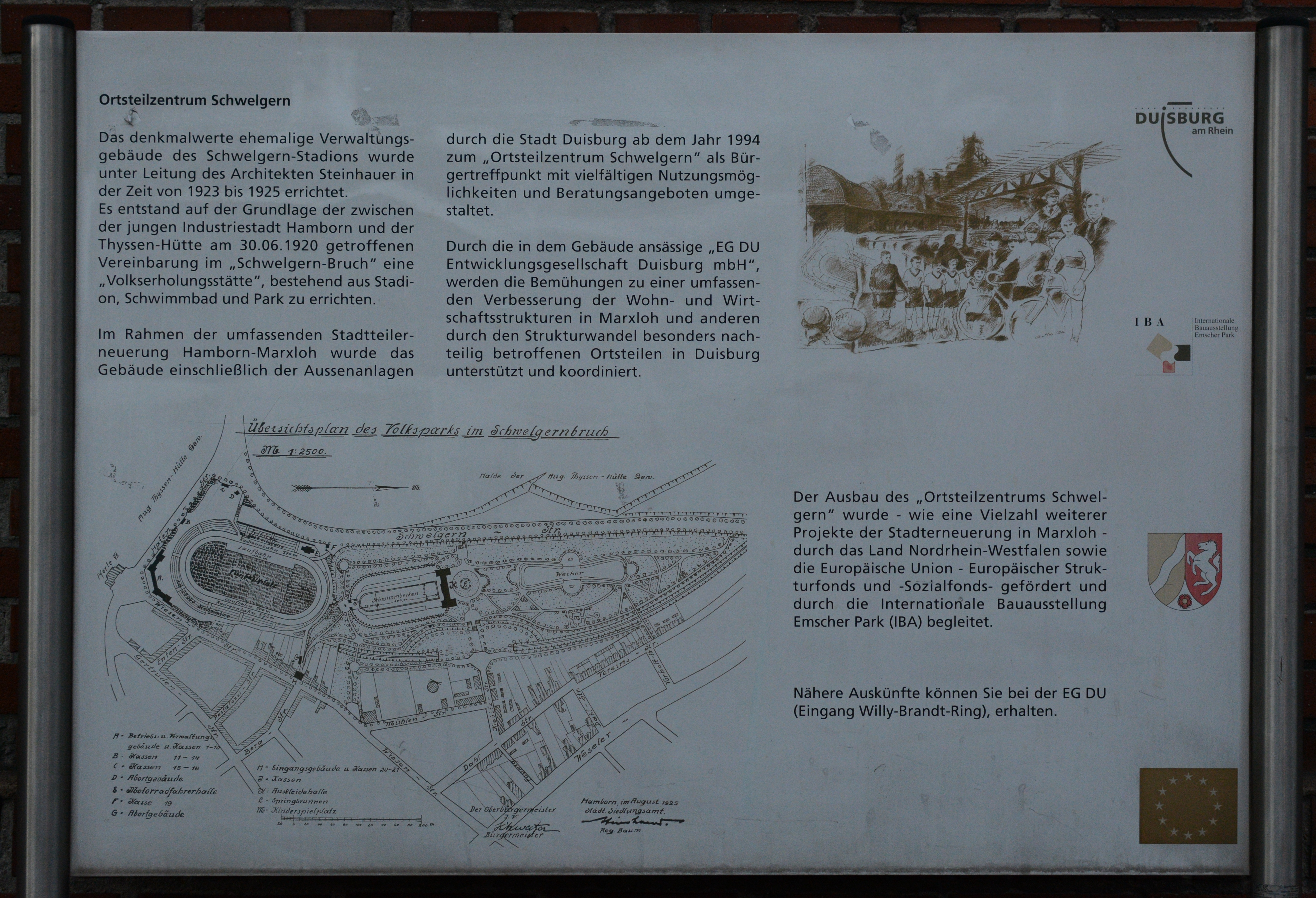 Schwelgernstadion